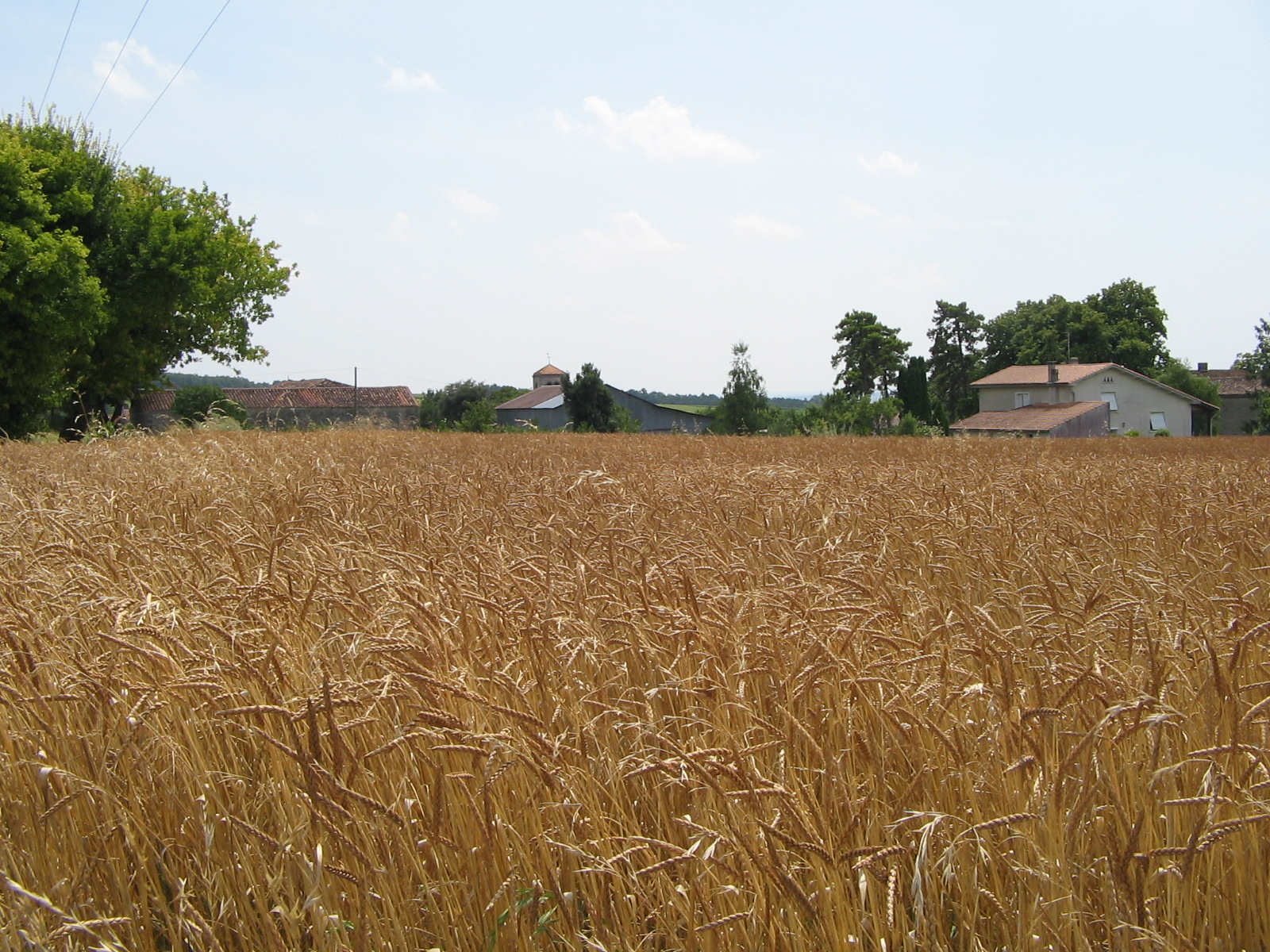 un champs d'Epeautre, juillet 2008 en Charente